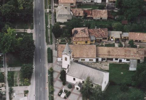 Naszály, Hungary, aerialphotography